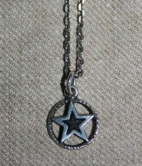 Pendentif avec étoile de Saint-Vincent